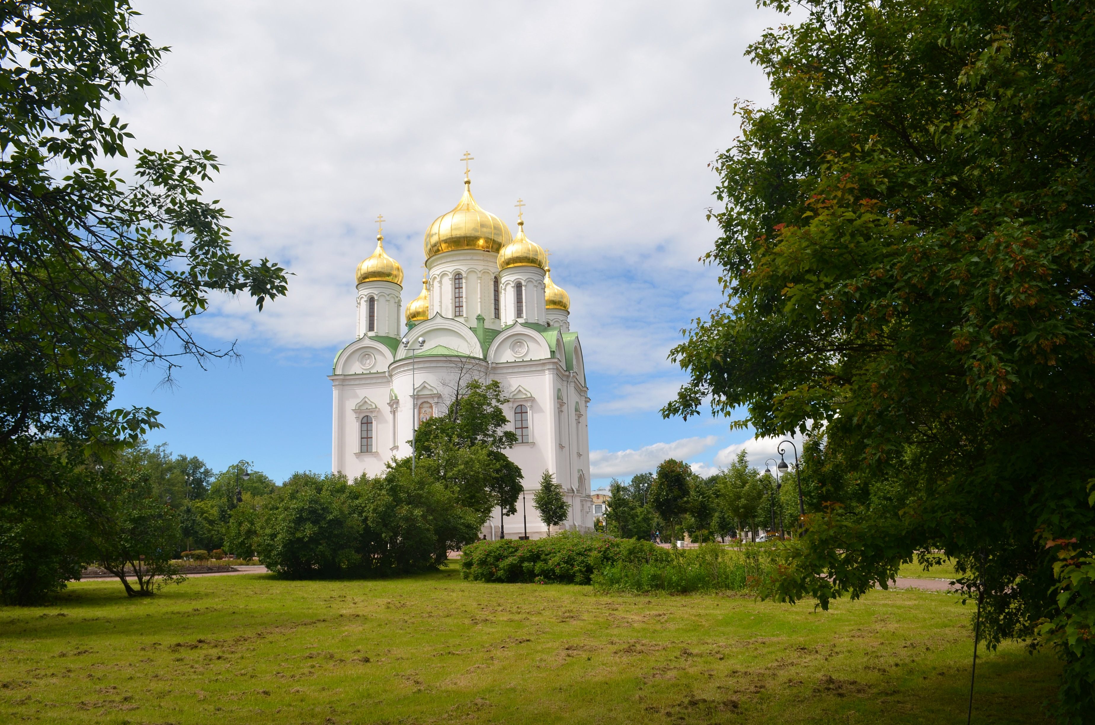 Пушкин. Екатерининский собор. 1835-1840